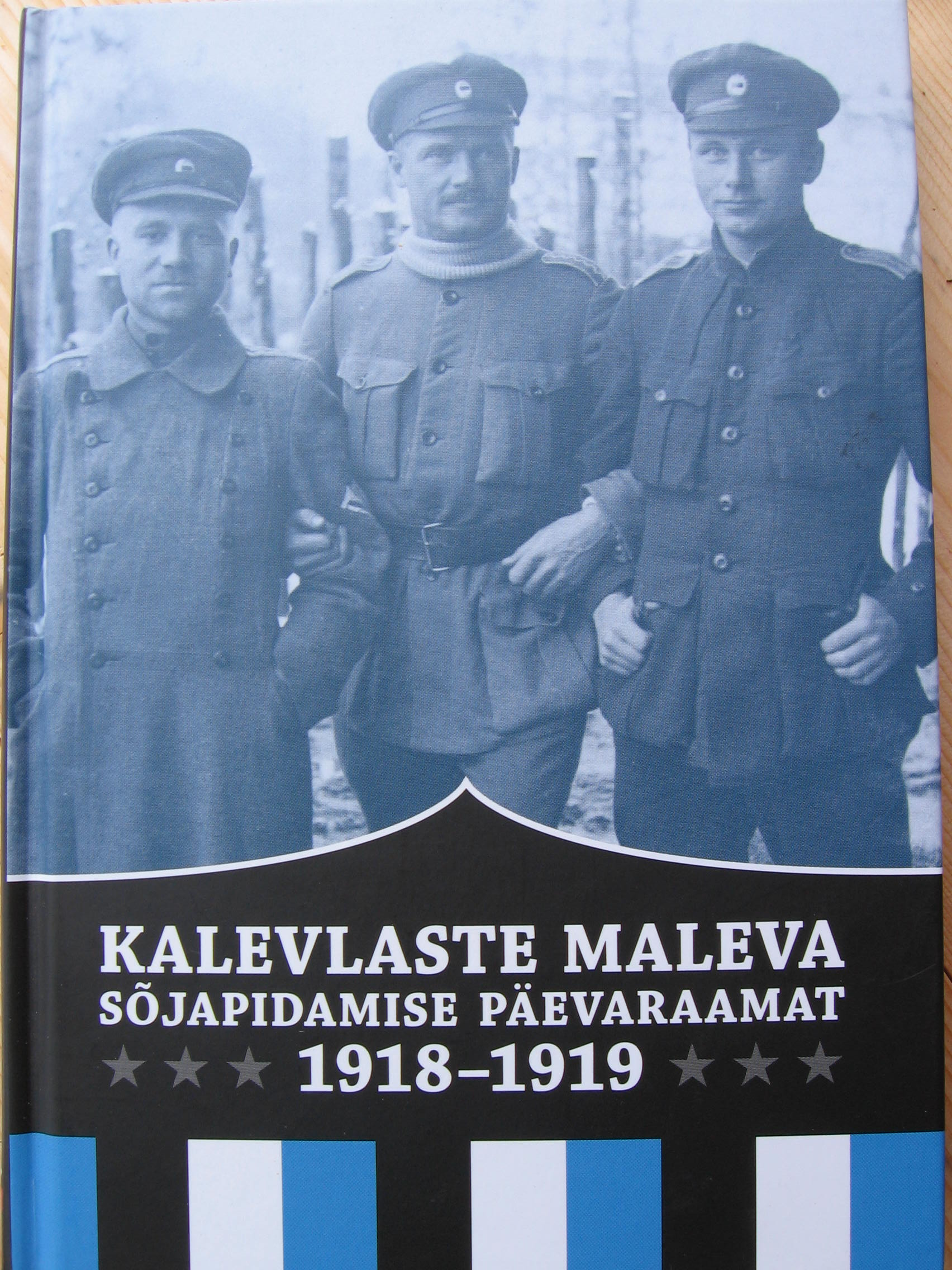 "Kalevlaste Maleva sõjapidamise päevaraamat 1918-1919", Grenader, 2015.